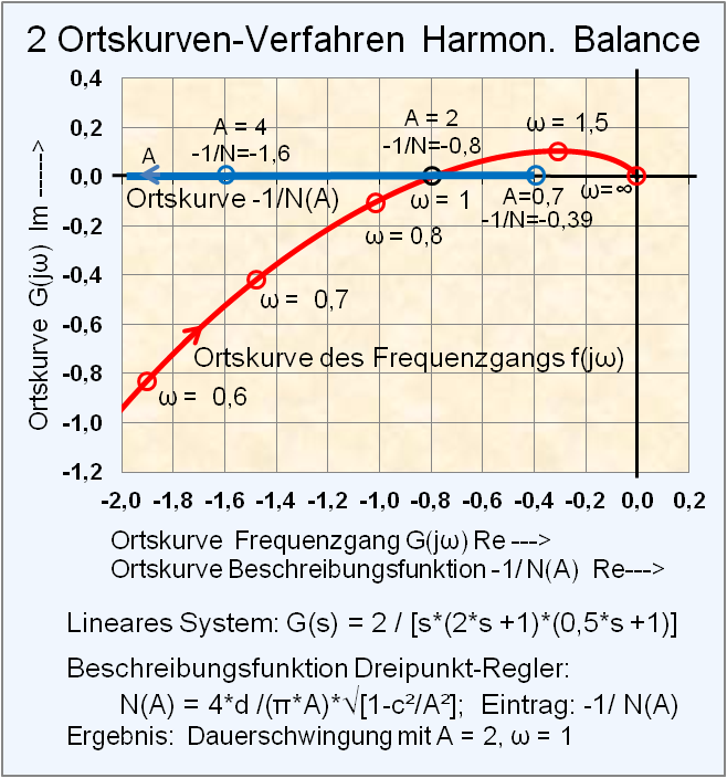 Zwei-Ortskurven-Verfahren der Harmonischen Balance für einen Regelkreis mit Dreipunkt-Regler